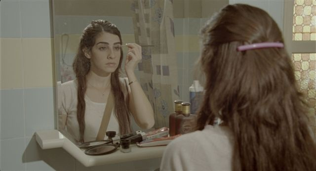 דאנה איבגי בסרטה של קרן ידעיה "כלת הים", 2009